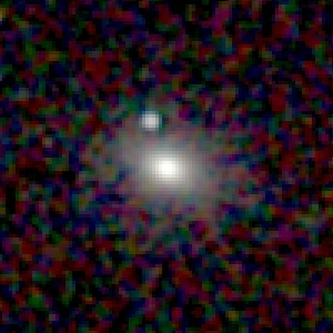 Galaxy NGC 76